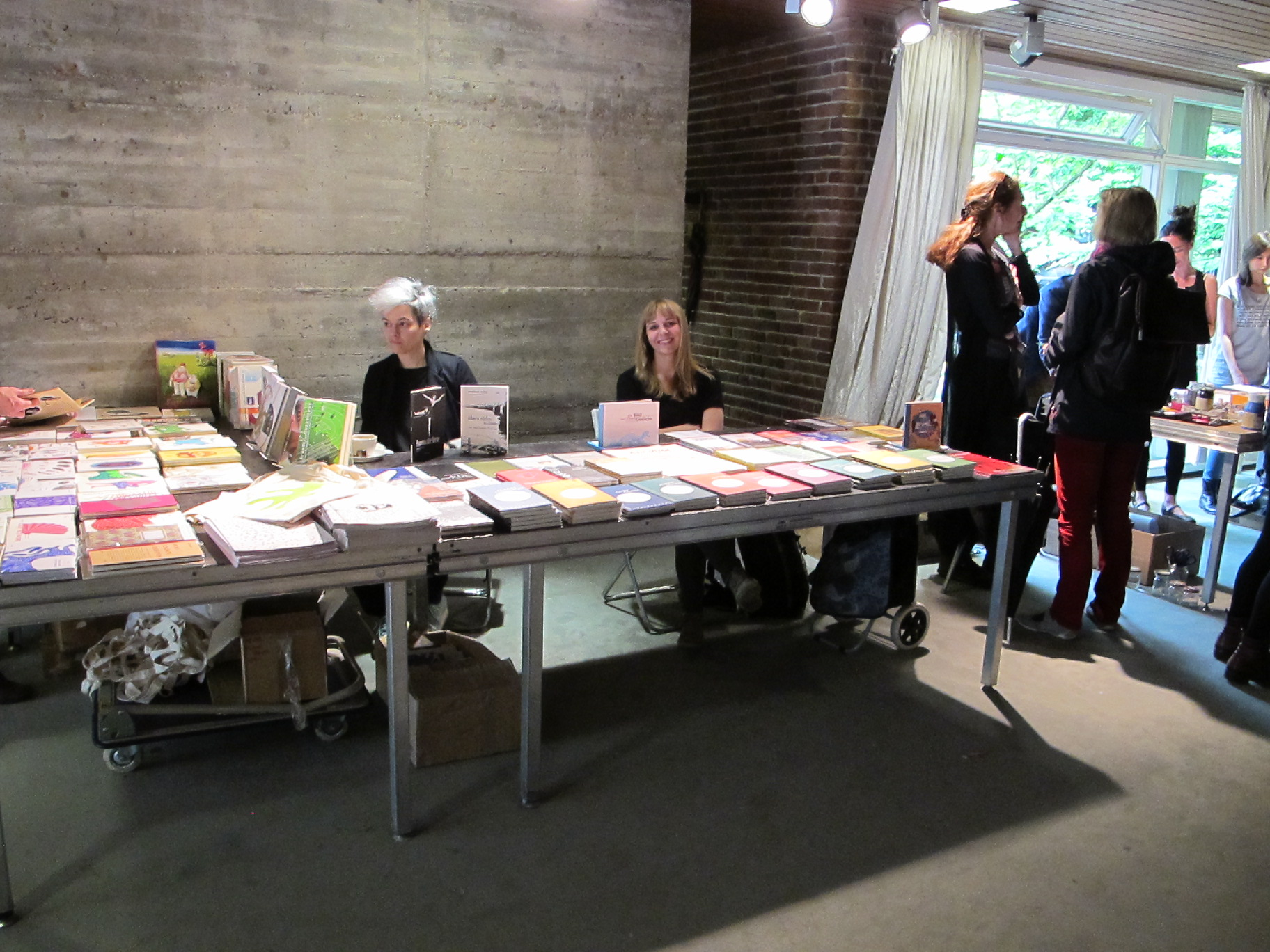 Lyrikmarkt Poesiefestival Berlin 2014, Stand von Kookboks und Horlemann Verlag